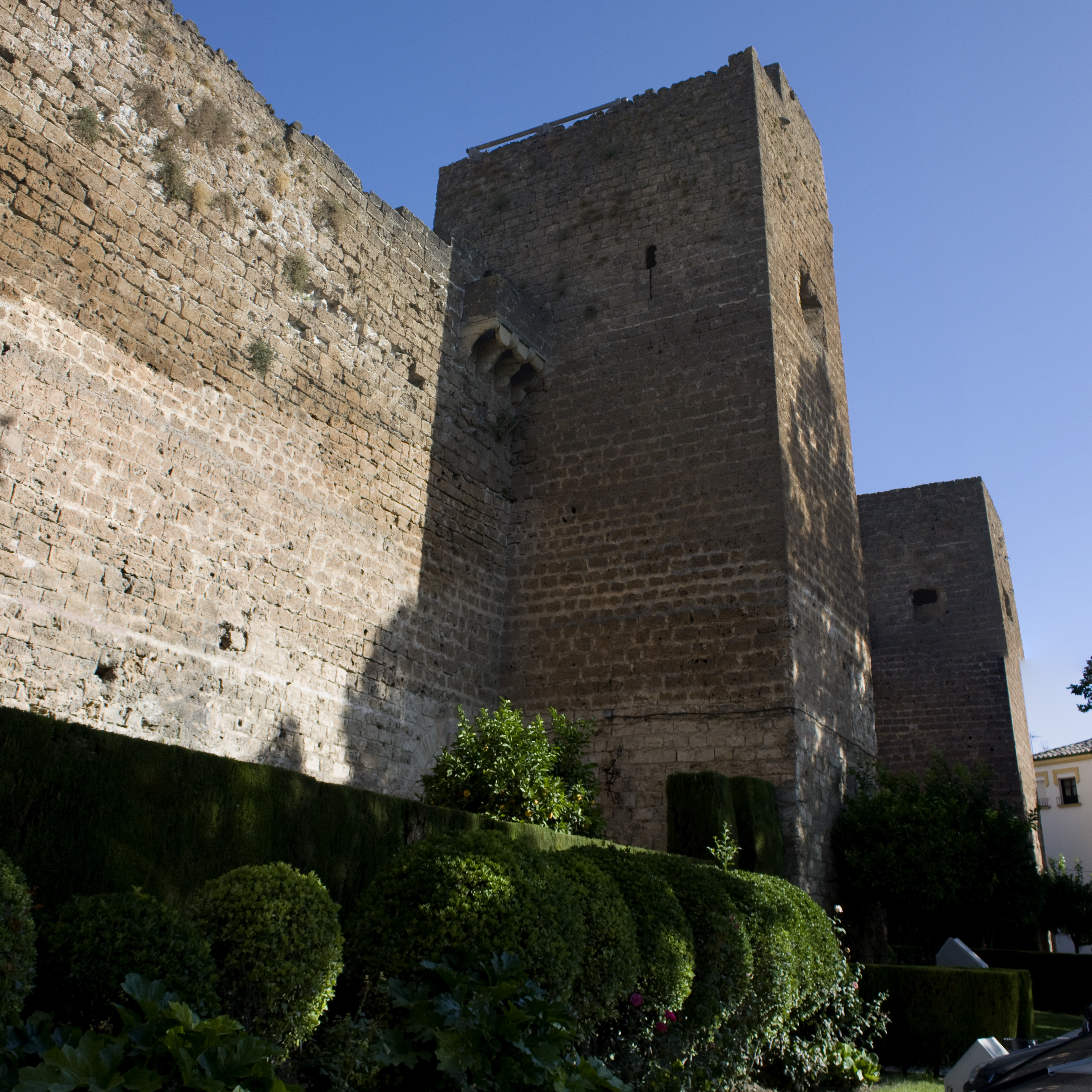 The castle, Priego de Córdoba, Spain